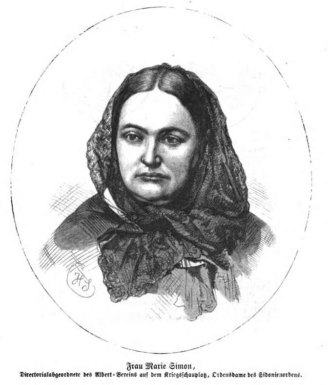 Marie Simon, Ordensschwester und Krankenpflegerin im 19. Jh.